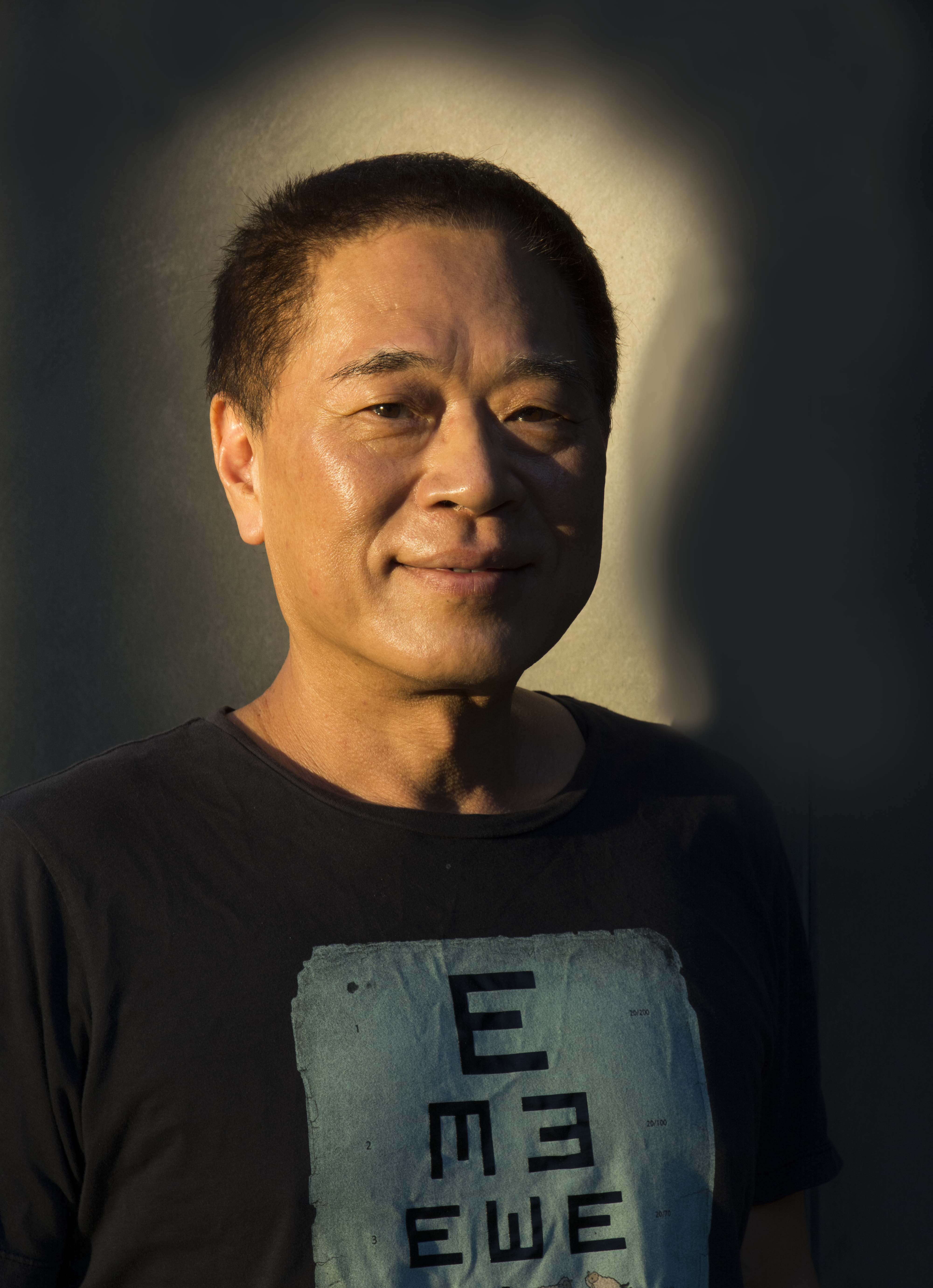 中文（台灣）: 藝術家張振宇的個人肖像照